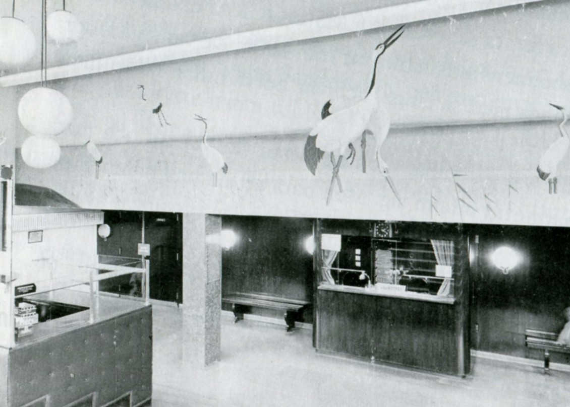 Biograf "tranan" på Kungsholmen, entréhallen